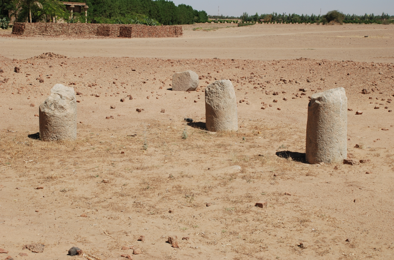 Sudan, Soba, Kirche auf Hügel C, Überreste